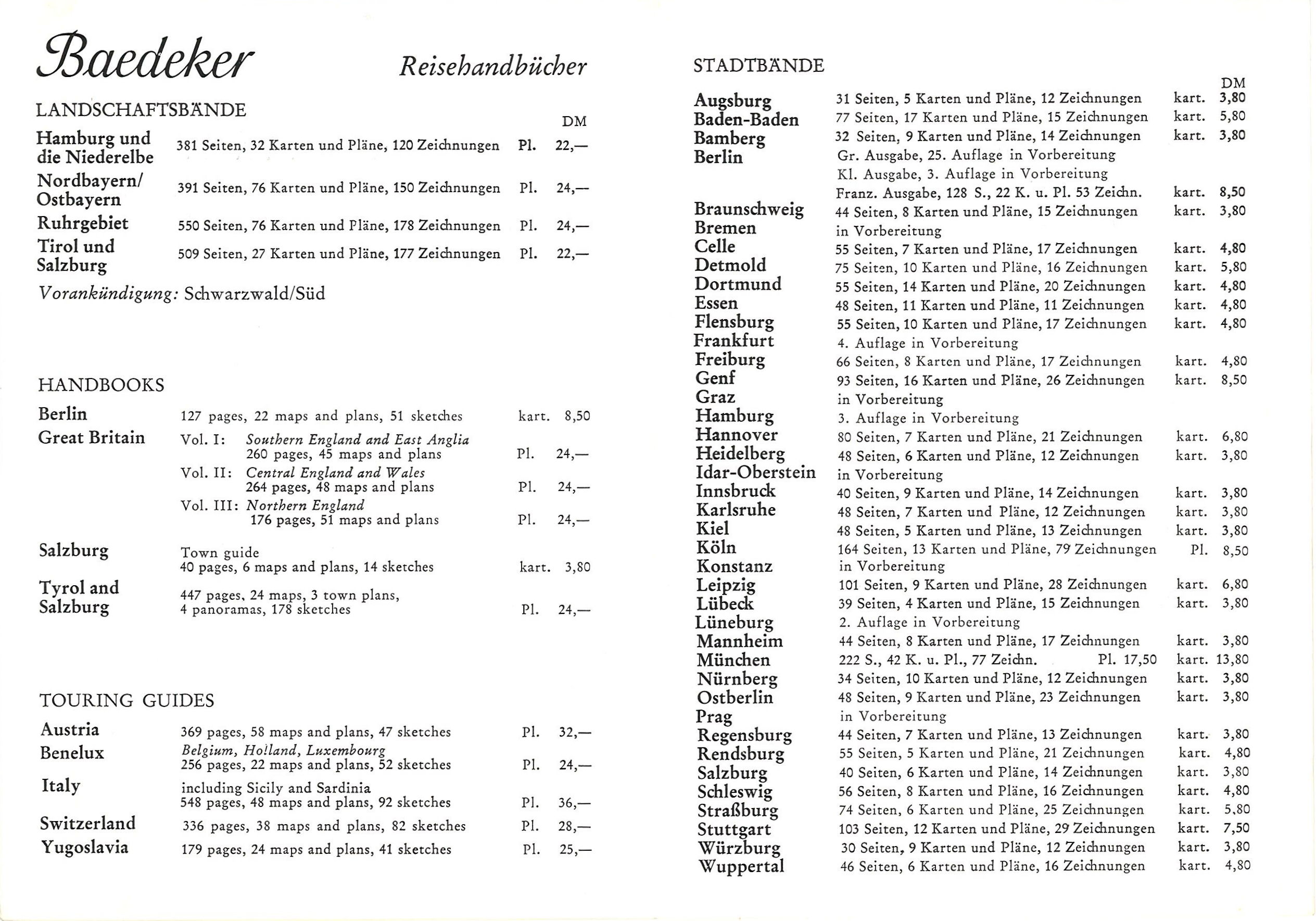 Baedeker-Gesamtverzeichnis 1974, Liste der Stadt- und Regionalführer